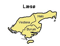 Læsø Herred, Hjørring Amt, Denmark Source: Map by Svend-Erik Christiansen